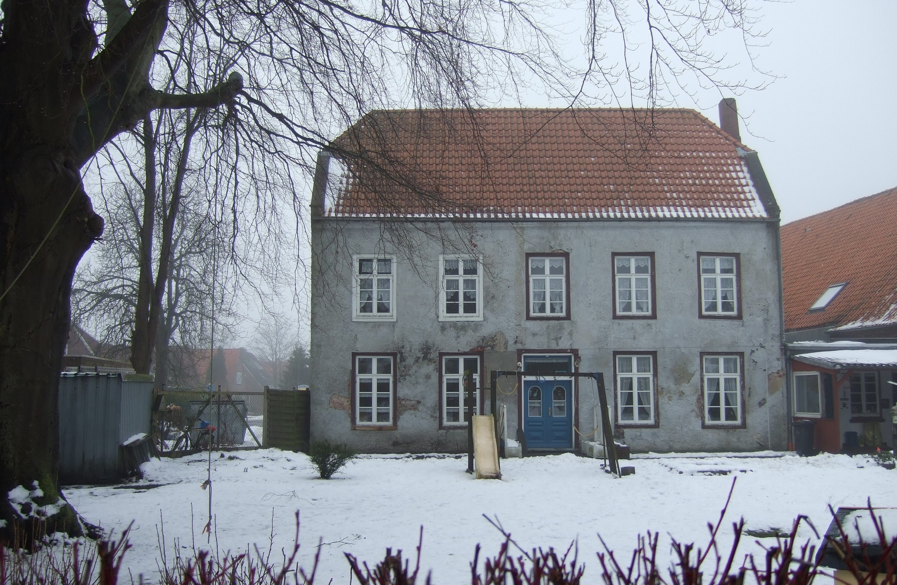 Heute so genanntes Ekeler Vorwerk am nördlichen Ende der Baumstraße, überformtes Steinhaus aus dem 16. Jahrhundert